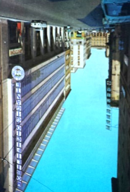 Mobilificio Gigante Pini - Via Grande - Livorno 1970